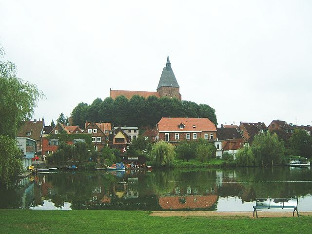 Blick auf die Möllner Altstadt vom gegeüberliegenden Ufer des Stadtsees aus